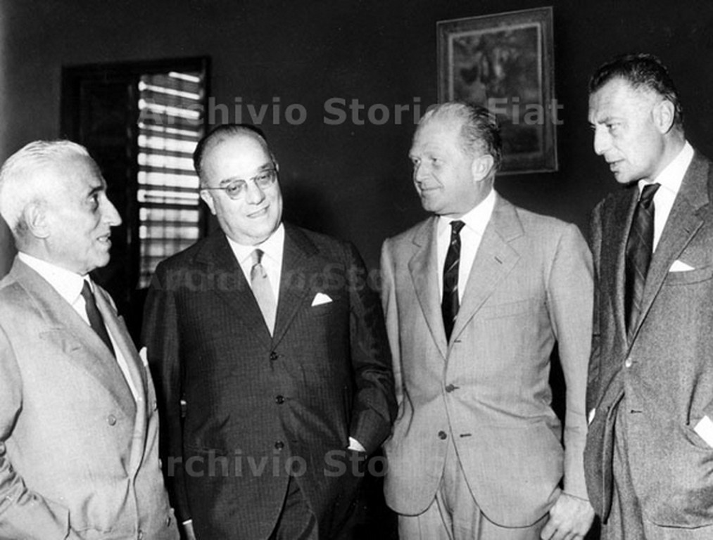 Fotografia a mezzo busto di Vittorio Valletta, Gaudenzio Bono, Giovanni Nasi, Gianni Agnelli (Fiat Group Marketing & Corporate Communication spa, Archivio e centro storico Fiat, Archivio iconografico, Personaggi Fiat, Gianni Agnelli; Vittorio Valletta; Gaudenzio Bono; Giovanni Nasi)